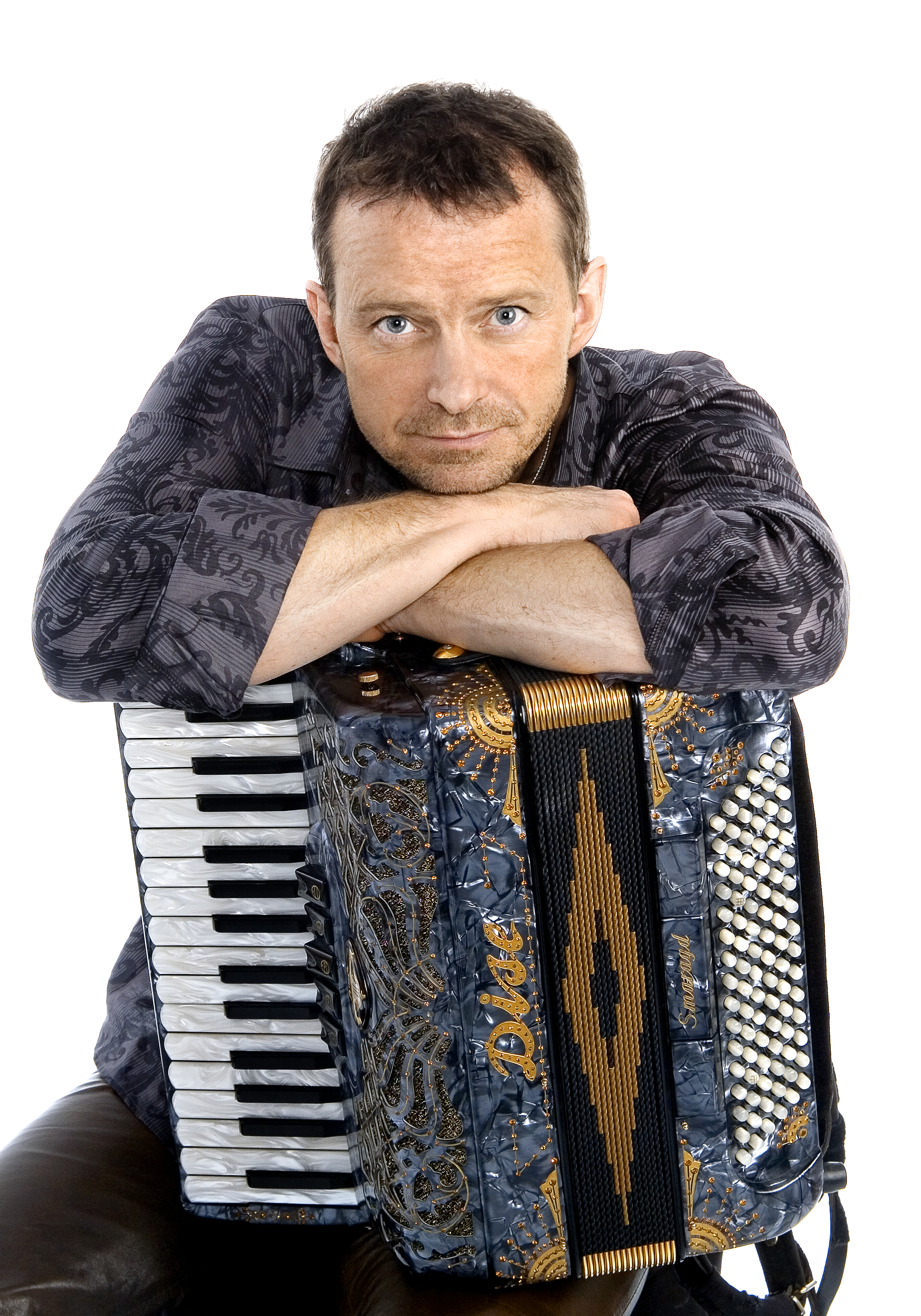 Dragspelaren Bengan Janson.